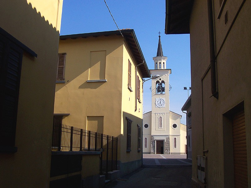 Liscate - Chiesa Parrocchiale di S. Giorgio vista da Via Mottironi